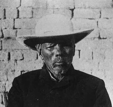 This image was copied from de. The original description was: Hendrik Witboi Text auf dem Bild: Südwestafrika.I. Gibeon. Hendrik Witboi. Oberhäuptling der - Witboihottentotten. Text auf der Hülle: Deutsch-Südwestafrika 1 37. Gibeon. Hendrik Witboi. - Oberhäuptling der Witboihottentotten. Entstehungsjahr Vorlage: 1892/1894 oder früher formale Bemerkung: Repro Photograph: Dove-Sammlung Region: Namibia - Gibeon - DSWA Einige der vom Kolonialen Bildarchiv in Frankfurt a. Main [1] veröffentlichten Bilder wurden von Mitarbeitern des Bildarchivs nachbearbeitet oder dort erstveröffentlicht. Eine Weiterverwendung ist unter der Auflage einer deutlichen Quellenangabe gestattet.